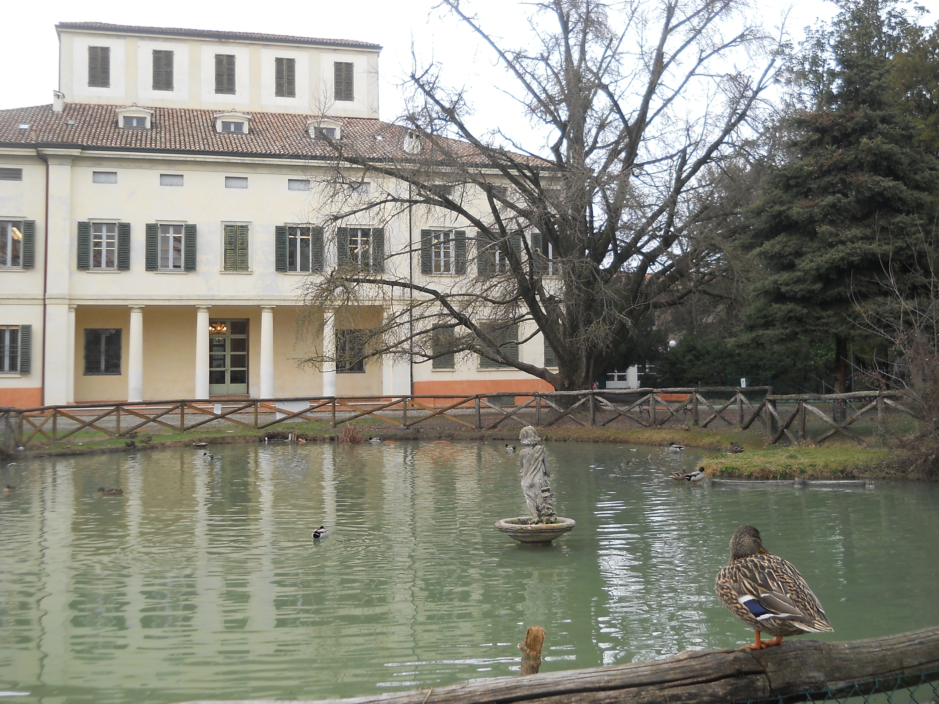 Villa Gandini a Formigine (Modena) con laghetto